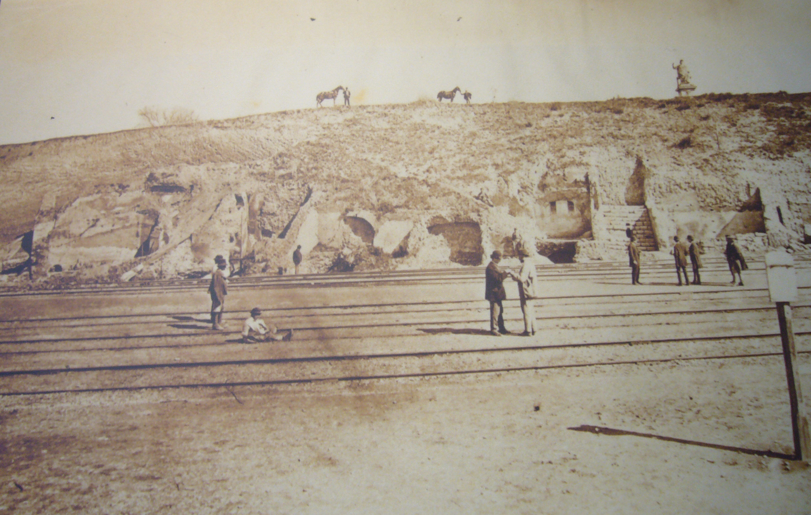 Roma, Palazzo Massimo alle Terme, foto della demolizione del monte della Giustizia (1862); in alto, la statua della c.d. Giustizia.